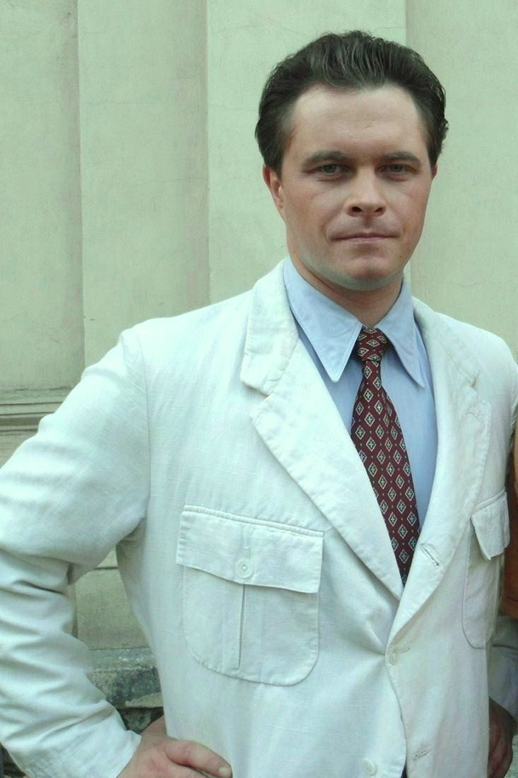 Tomasz Schuchardt jako Eugeniusz Bodo (w starszym wieku) na planie serialu "Bodo".